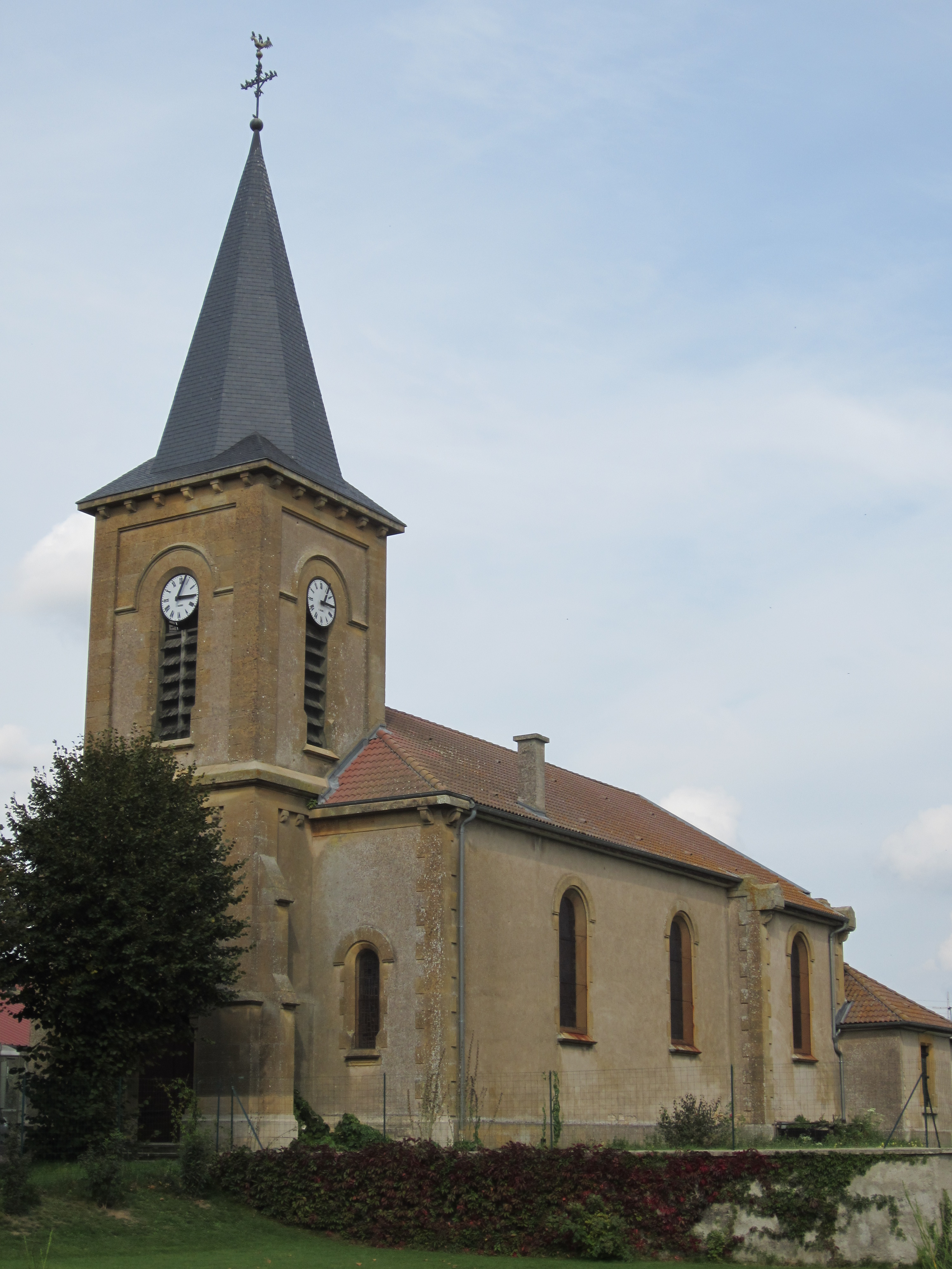 Description eglise Hageville eglise Hageville